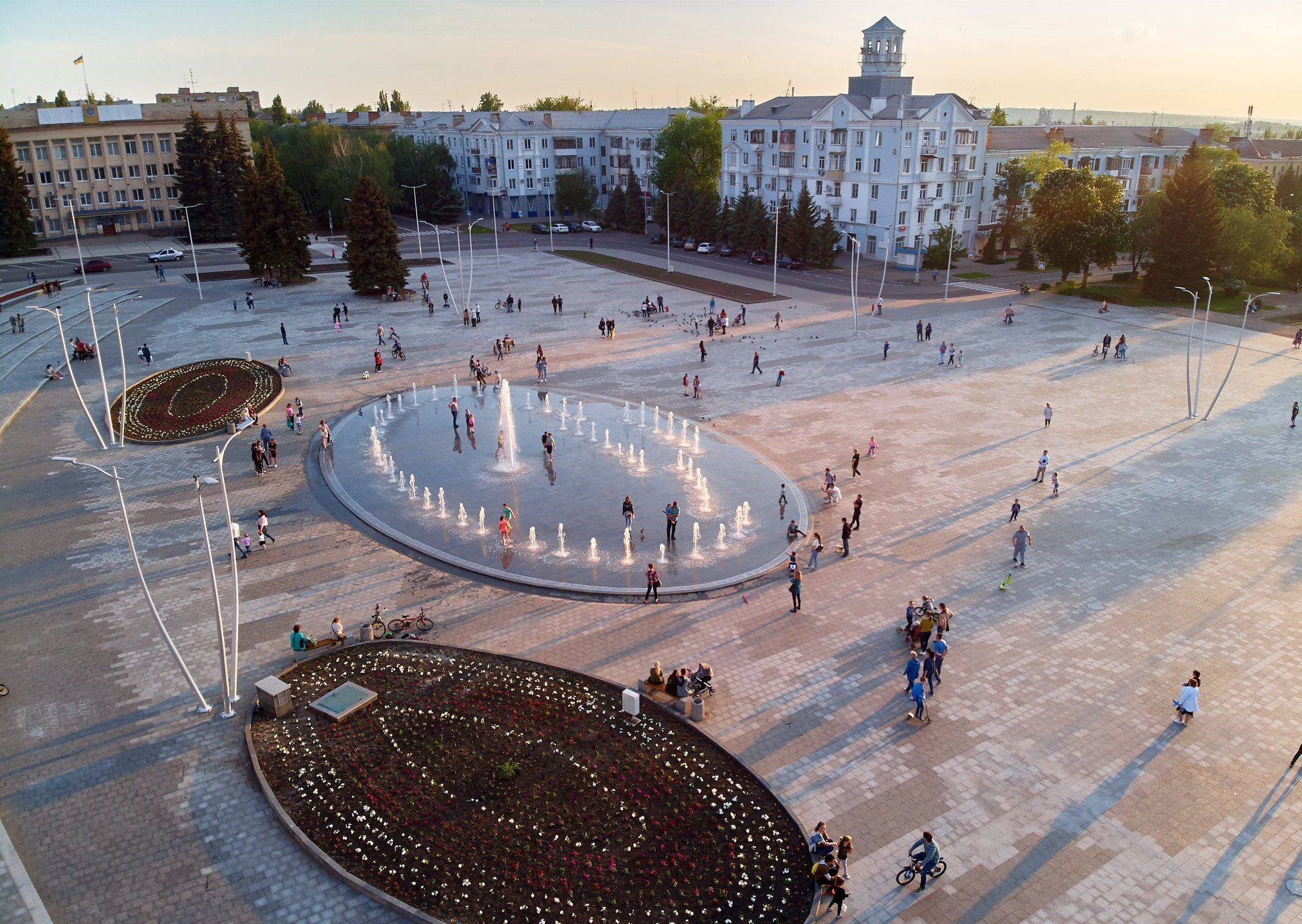 Площа Миру у Краматорську вид з верху. На тлі ліворуч — міська рада Краматорська, житлові будинки вул. Академічна №48, проспект Миру №10.